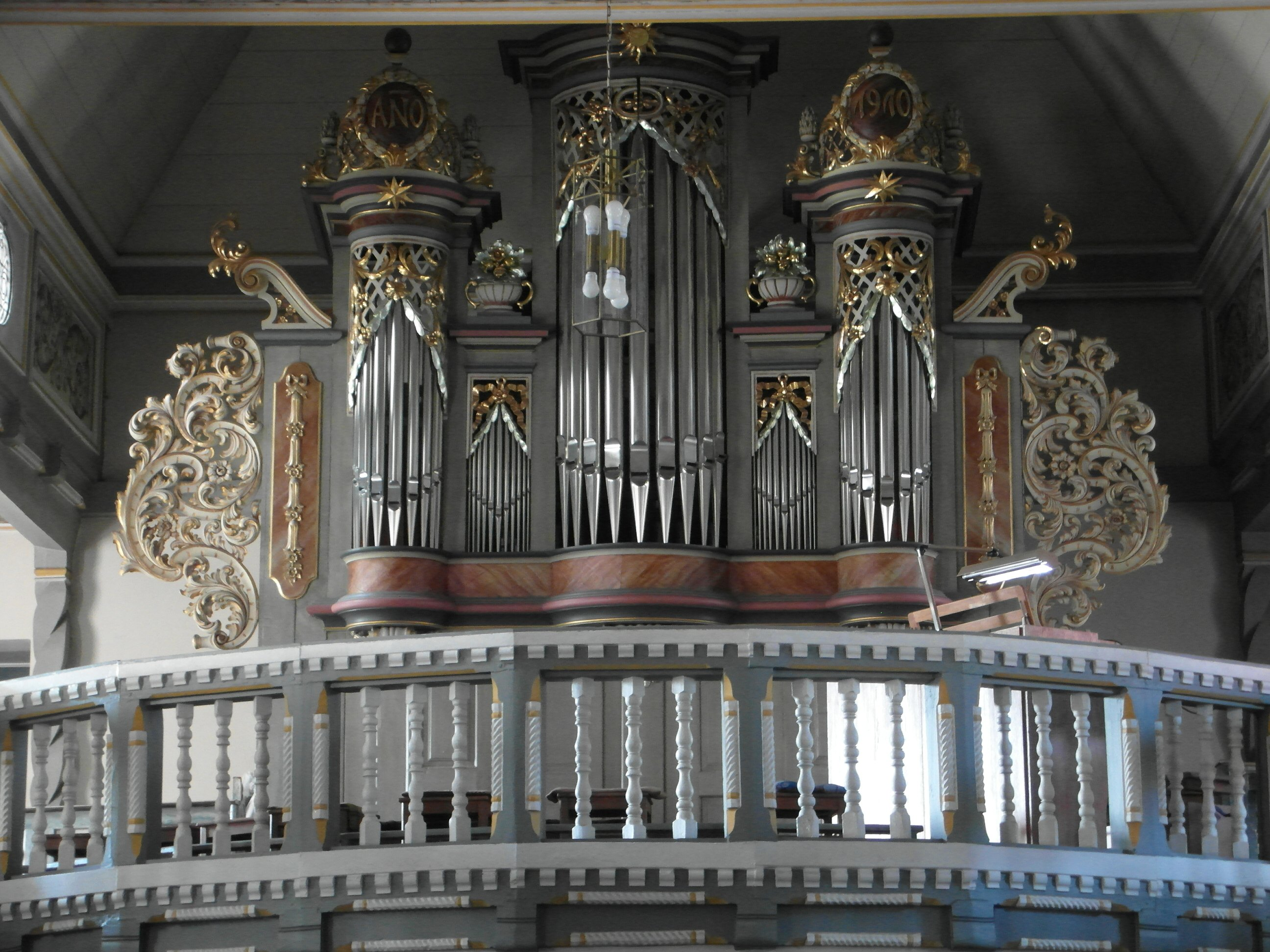 Orgel von Lothar Heinze (1968) in Uder St.Jakobus, IIP/19